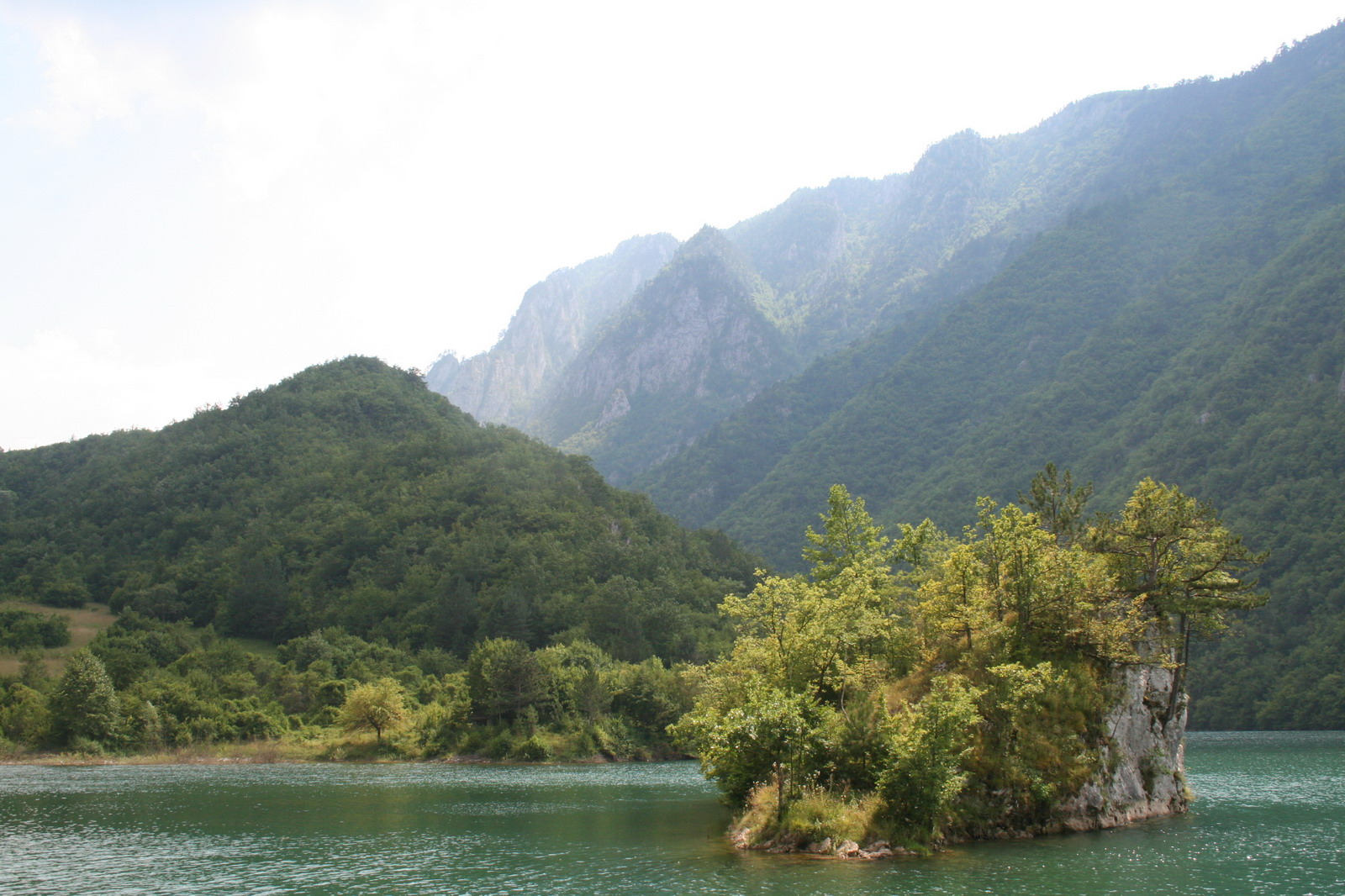 Drina river